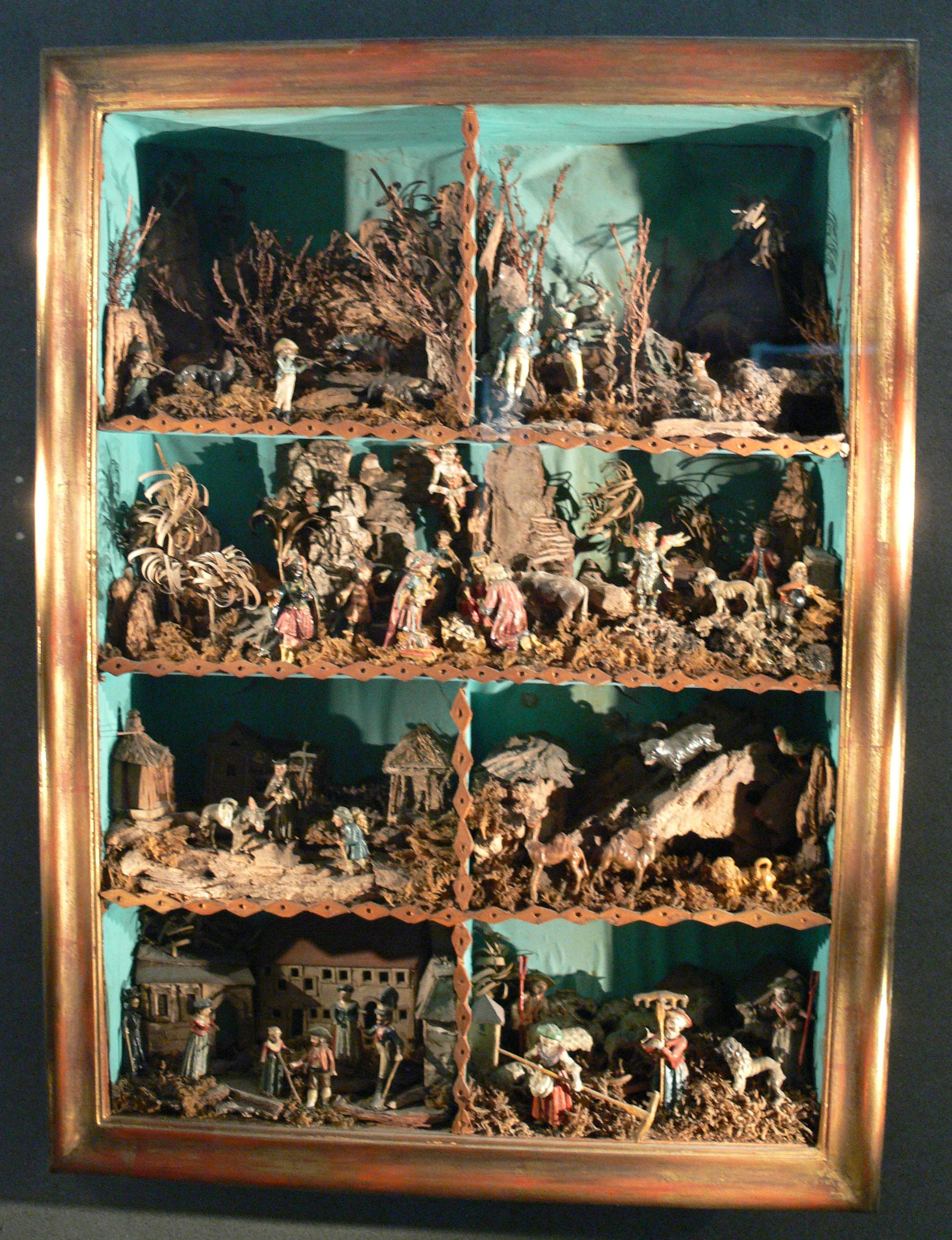 Anbetung der Könige, Berchtesgaden um 1800; Krippensammlung des Bayerischen Nationalmuseums, München, Inv. Nr. Krippe 5545